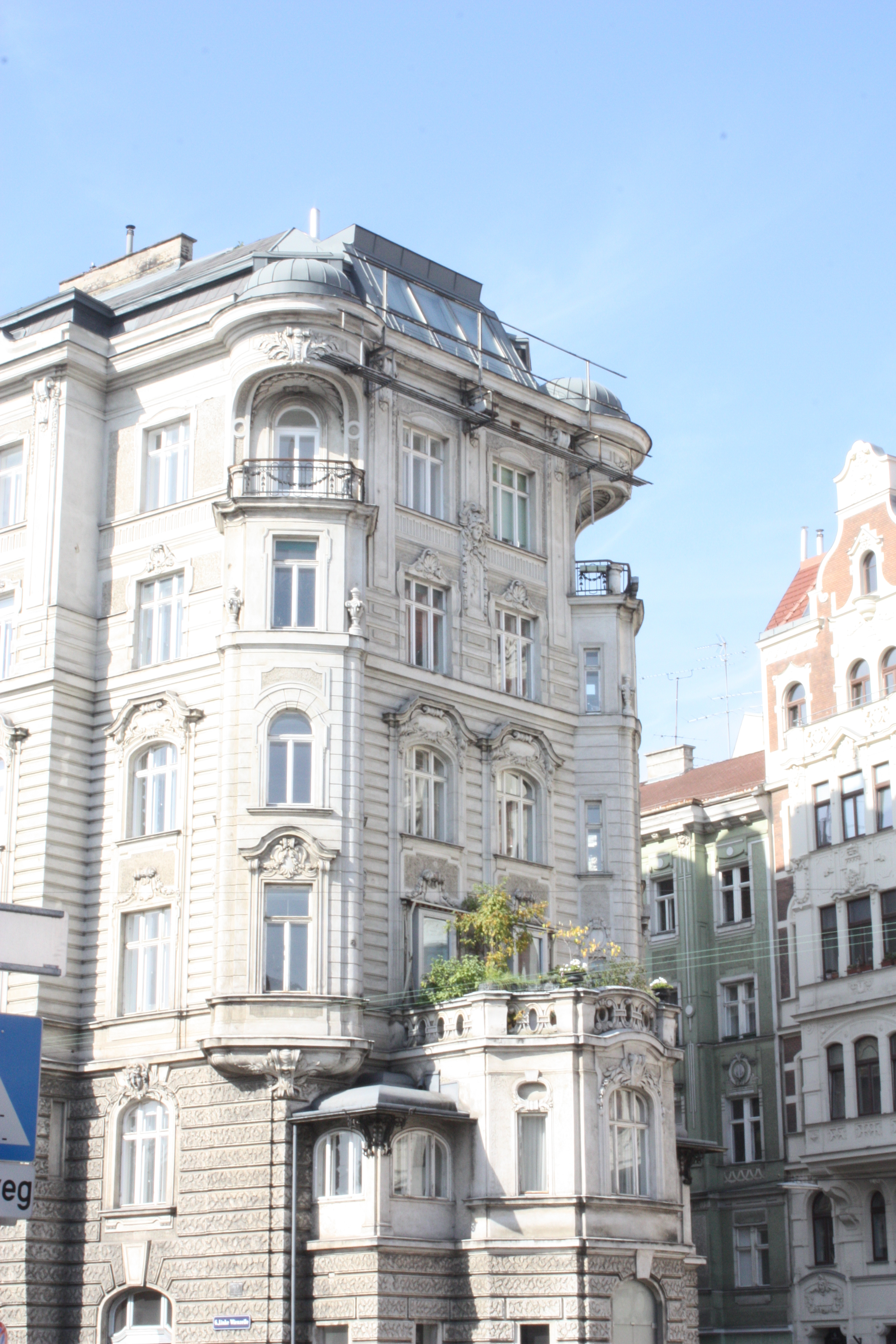 Zentrum, Vienna, Wien